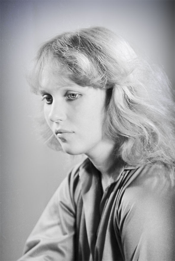 Porträt im Studio - Ausgleichsentwicklung A49 1:2,5, 30 min